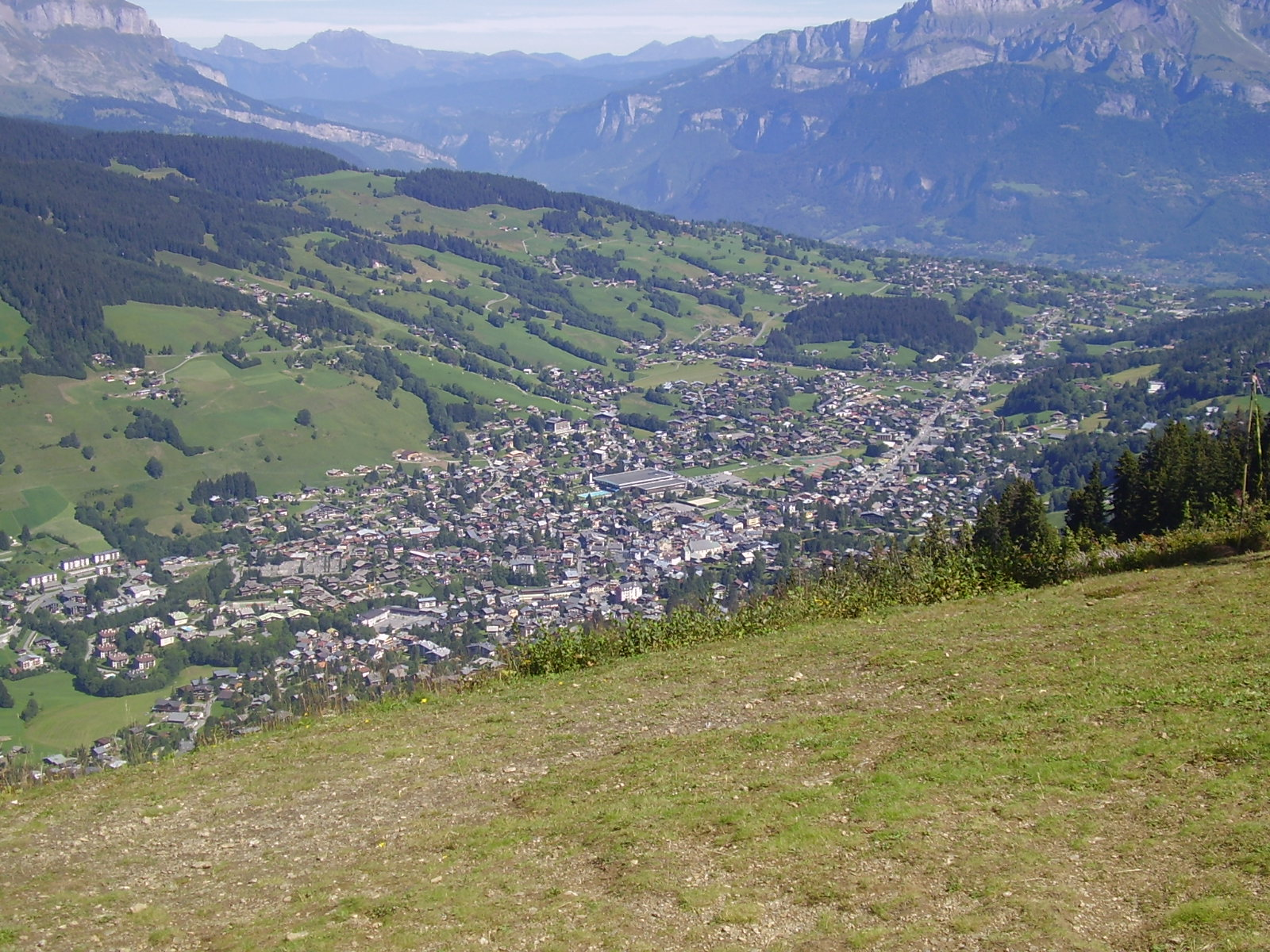 Vue de Megève depuis Rochebrune (altitude approximative 1750 mètres)